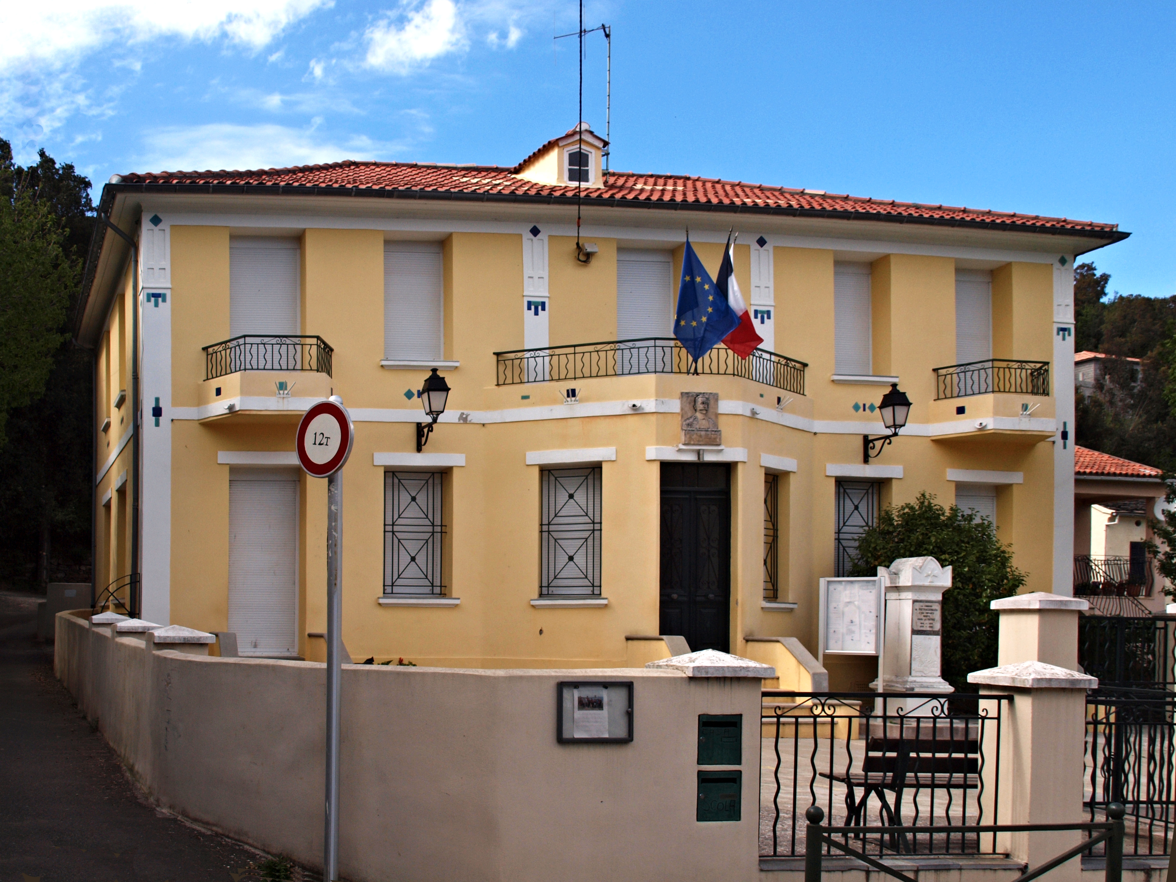 Pietracorbara, Cap Corse (Corse) - La mairie de Pietracorbara à Oreta